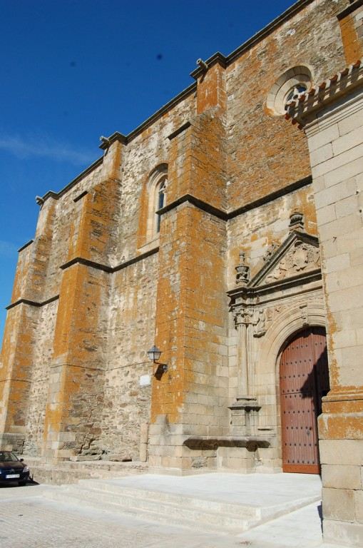 La capilla mayor es de menor altura y anchura que la nave, su planta es poligonal precedida de un tramo recto. Este se cubre con una b�veda de crucer�a con terceletes, mientras la ochava del �bside presenta una de crucer�a estrellada, con escudo de los Carvajal y s�mbolos de la pasi�n y vegetales. ( Latitud: 39º 58' 48.46" N Longitud: 6º 2' 36.43" O Altitud -srtm3:468 m (SERVIL-W)